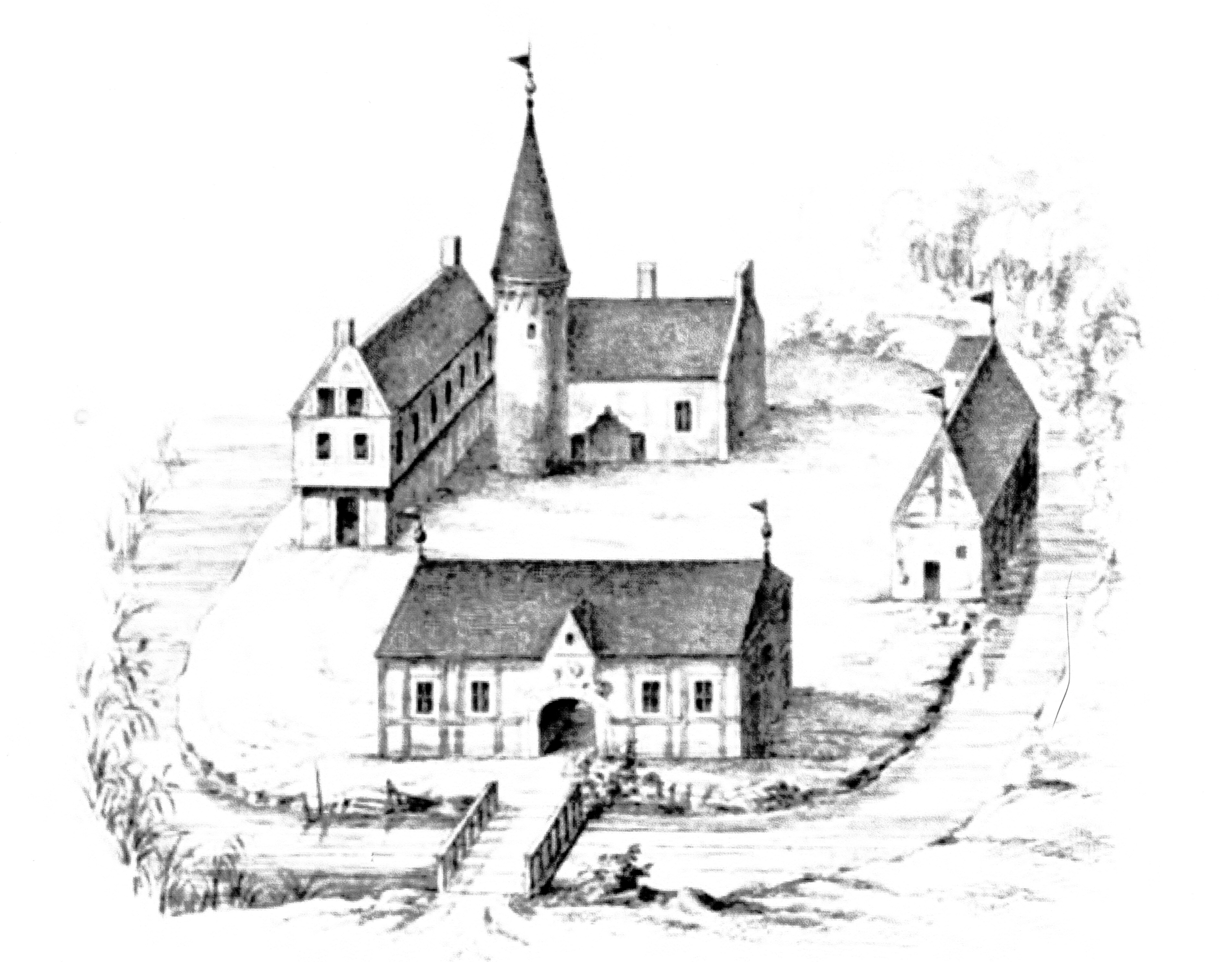 Adliges Gut Ascheberg, Zeichnung von Köhler und Roisternitz 1862